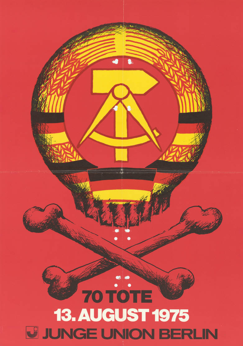 70 Tote 13. August 1975 Junge Union Berlin Abbildung: DDR-Staatswappen - gekreuzte Knochen Plakatart: Motiv-/Textplakat Künstler_Grafiker: Gero Hilliger Auftraggeber: Junge Union Berlin Objekt-Signatur: 10-028 : 238 Bestand: Plakate von Jugendorganisationen der Parteien ( 10-028) GliederungBestand10-18: Plakate von Jugendorganisationen der Parteien (10-028) » CDU » Motiv- und Textplakate Lizenz: KAS/ACDP 10-028 : 238 CC-BY-SA 3.0 DE